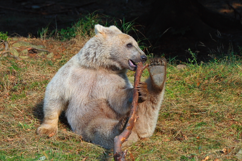 Eddie, Foto:Stefan Knöpfer/VIER PFOTEN